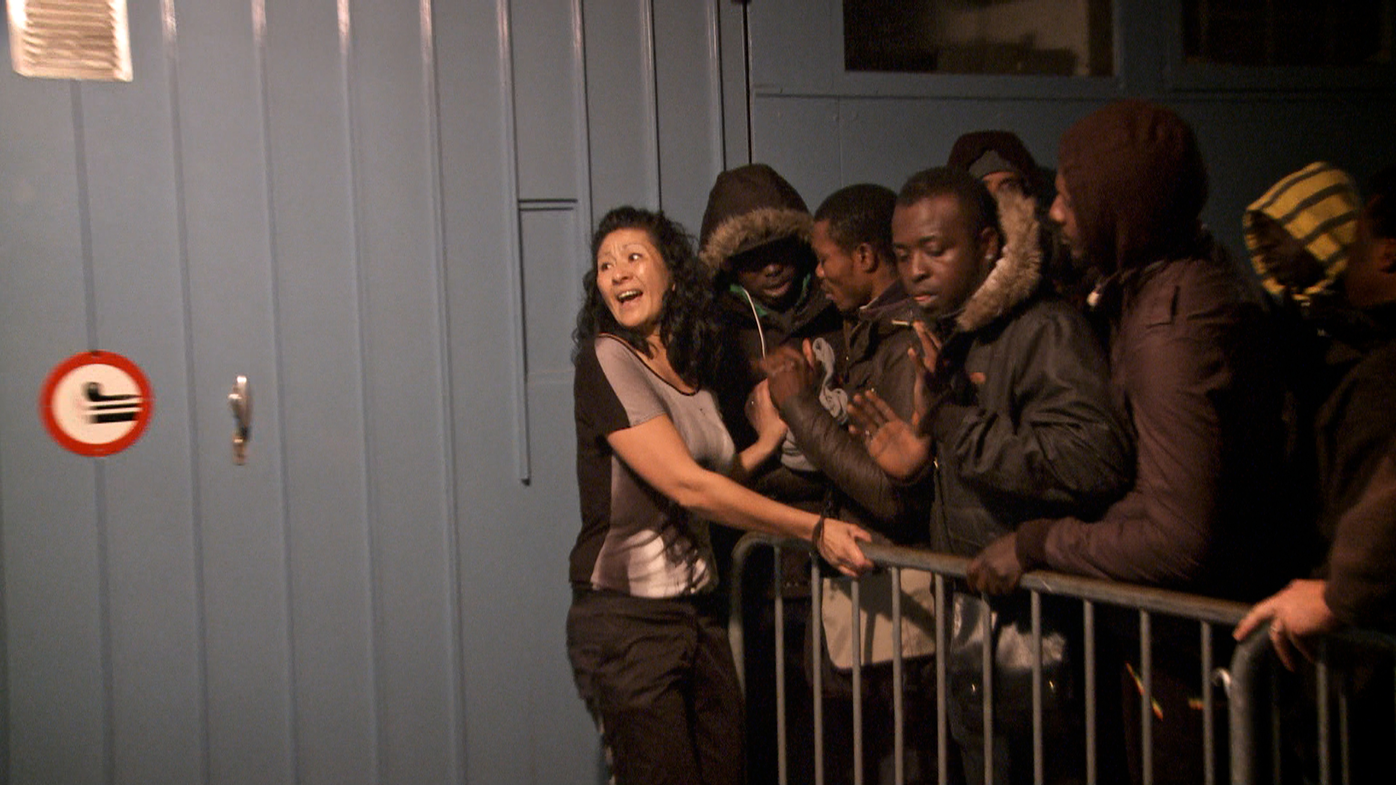 Une veilleuse essaie de contenir les sans-abri. Image tirée du film « L’abri » de Fernand Melgar